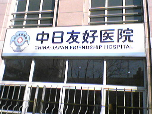 China-Japan Friendship Hospital Zhong-Ri Youhao Yiyuan 中日友好医院